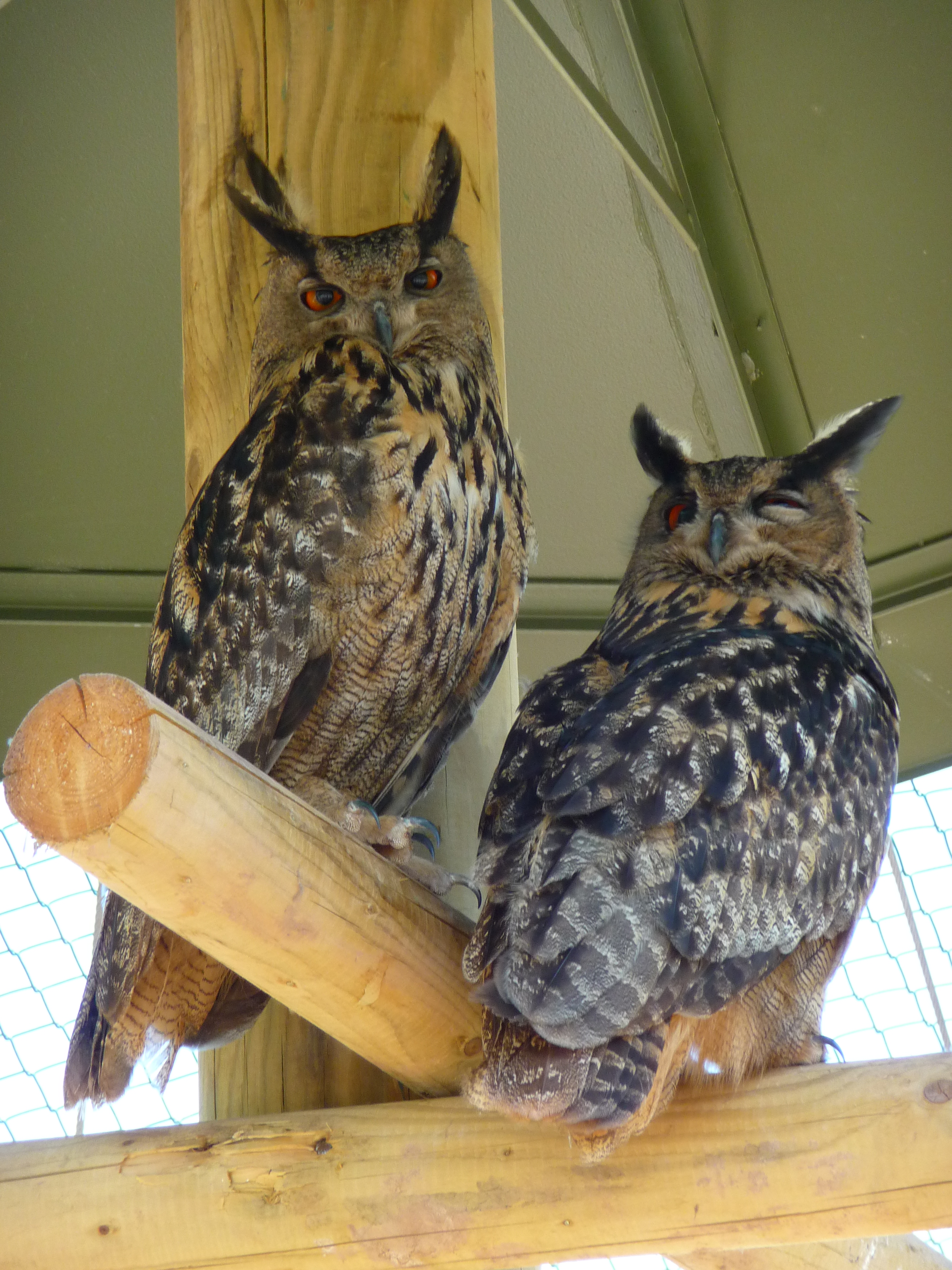 Uhu (Bubo bubo) im Wildpark Tripsdrill (Baden-Württemberg, Deutschland), gut erkennbar die charakteristischen Federohren